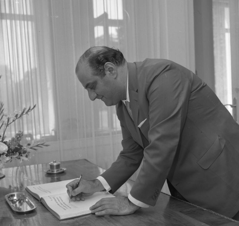 Bundespräsident Lübke empfängt Nationalrat von Uruguay Dr. Alberto Abdala